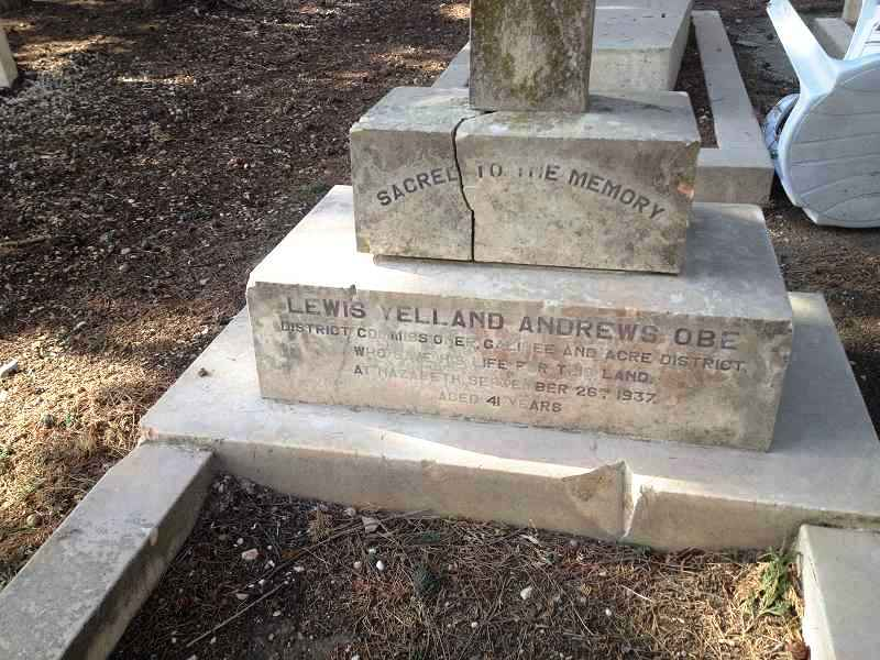 Lewis Yelland Andrews (1896-1937) war der britische Distriktsbeauftragte für Galiläa während des Britischen Mandats für Palästina. Auf dem Weg zur Christuskirche in Nazareth fiel er am 26. September 1937 einem arabischen Terrorakt zum Opfer.